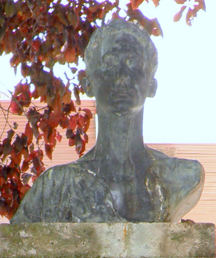 Busto de Regino Sáinz de la Maza en Burgos - pro parte.